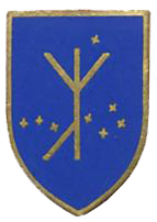 Mitgliedsabzeichen der Artamanen. - Auf dem Artamanen-Abzeichen ist eine Binderune, die sich aus der Man-Rune und der Ar-Rune aus der Runenreihe der Armanen zusammensetzt. "Man" bedeutet "Mensch" und "Ar" bedeutet "Acker". Durch diese Binderune soll der erdverbundene Mensch, der Hüter der Scholle, symbolisiert warden. Die 8 Sterne stellen den Polarstern und die 7 Sterne des Großen Wagens dar.